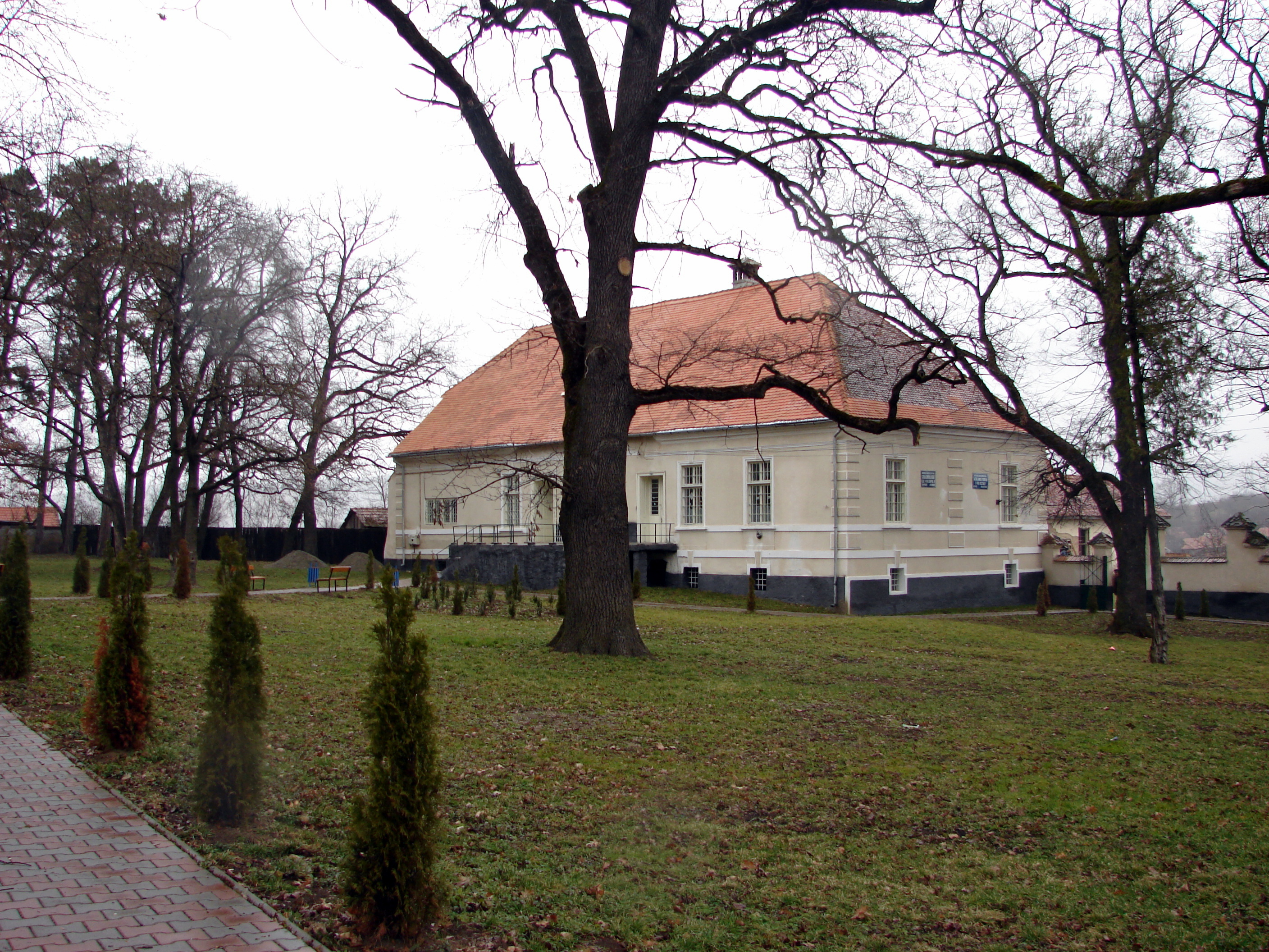 Ansamblul castelului Haller